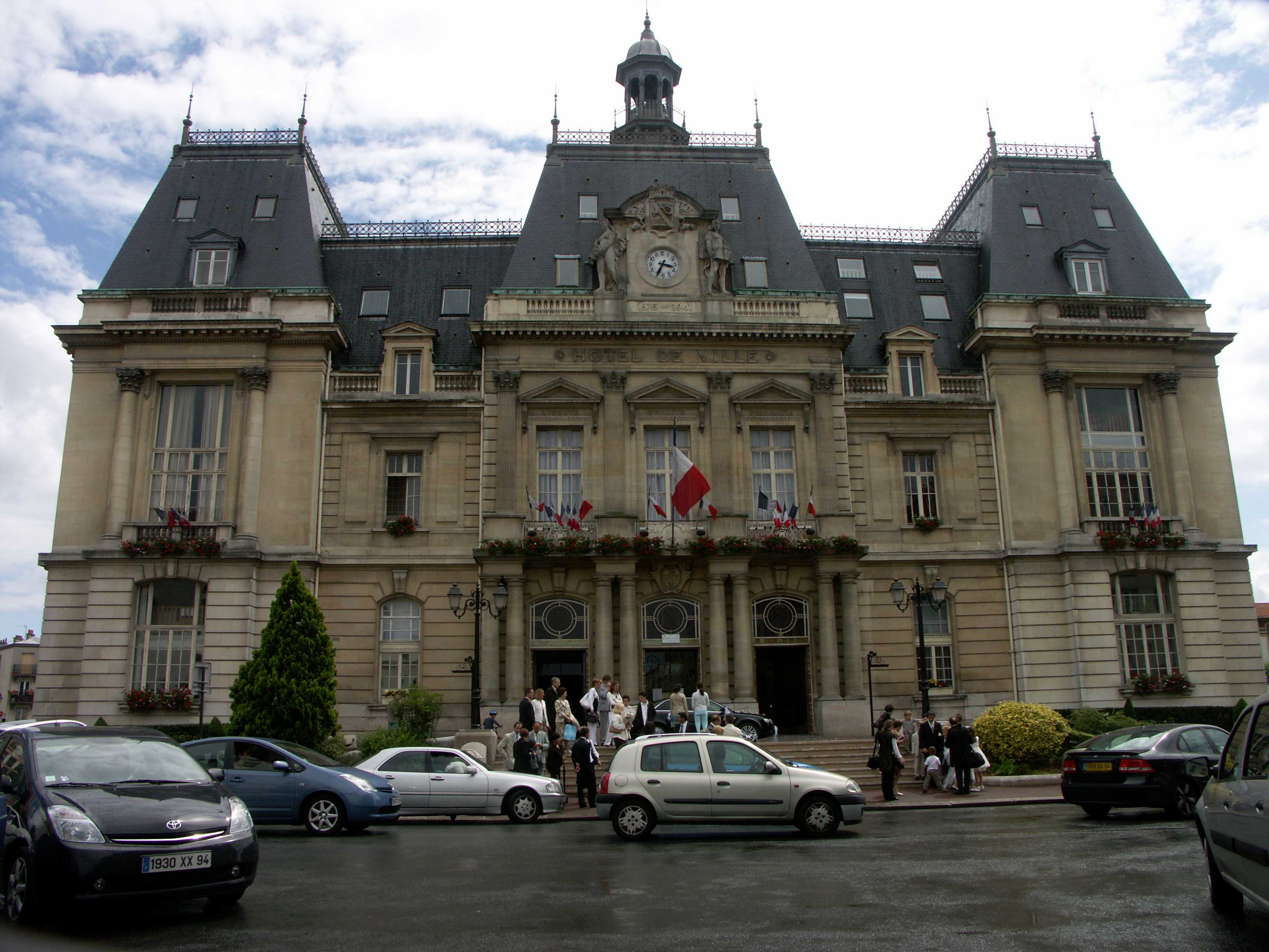 Hotel de ville de Saint Maur des Fossés - Val de Marne